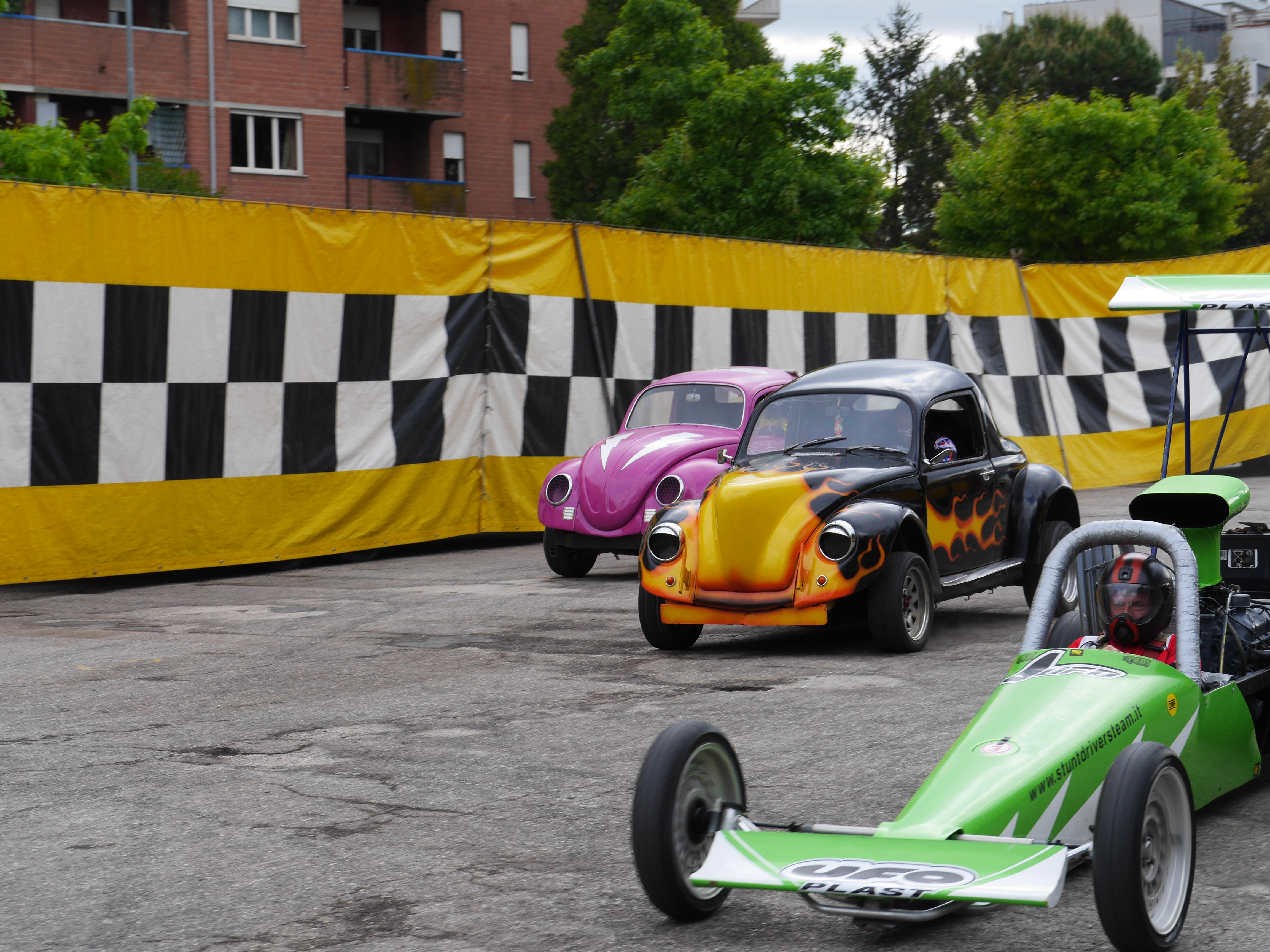 This photo was taken with Panasonic Lumix DMC-GH3 camera, thanks to Panasonic. You can see all photographs in category: Taken with Panasonic Lumix DMC-GH3.